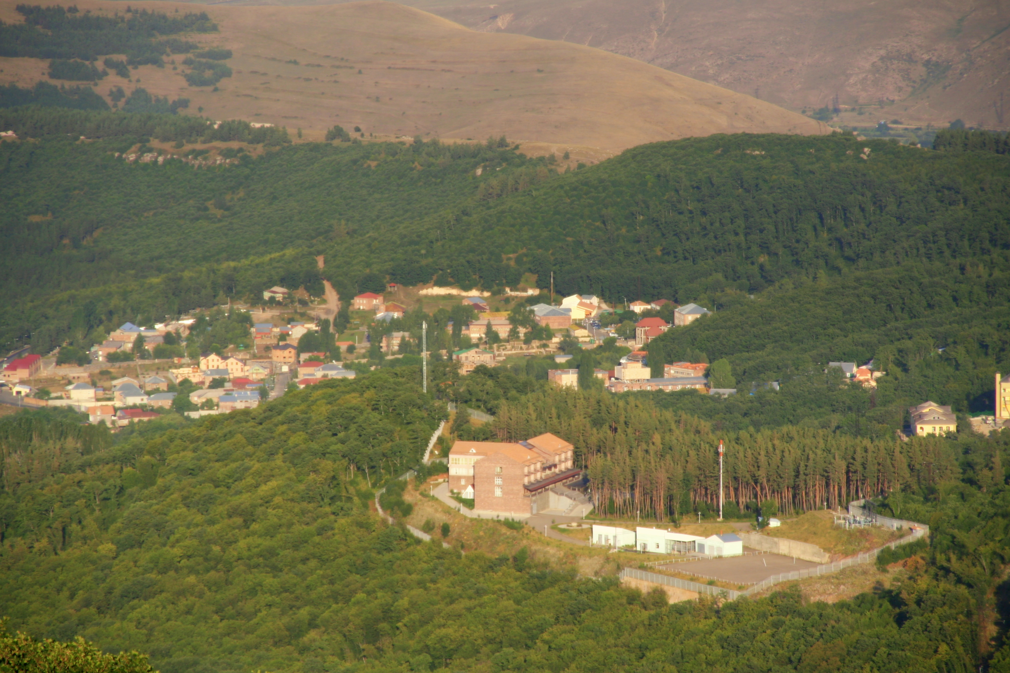 Tsarghgadzor en été